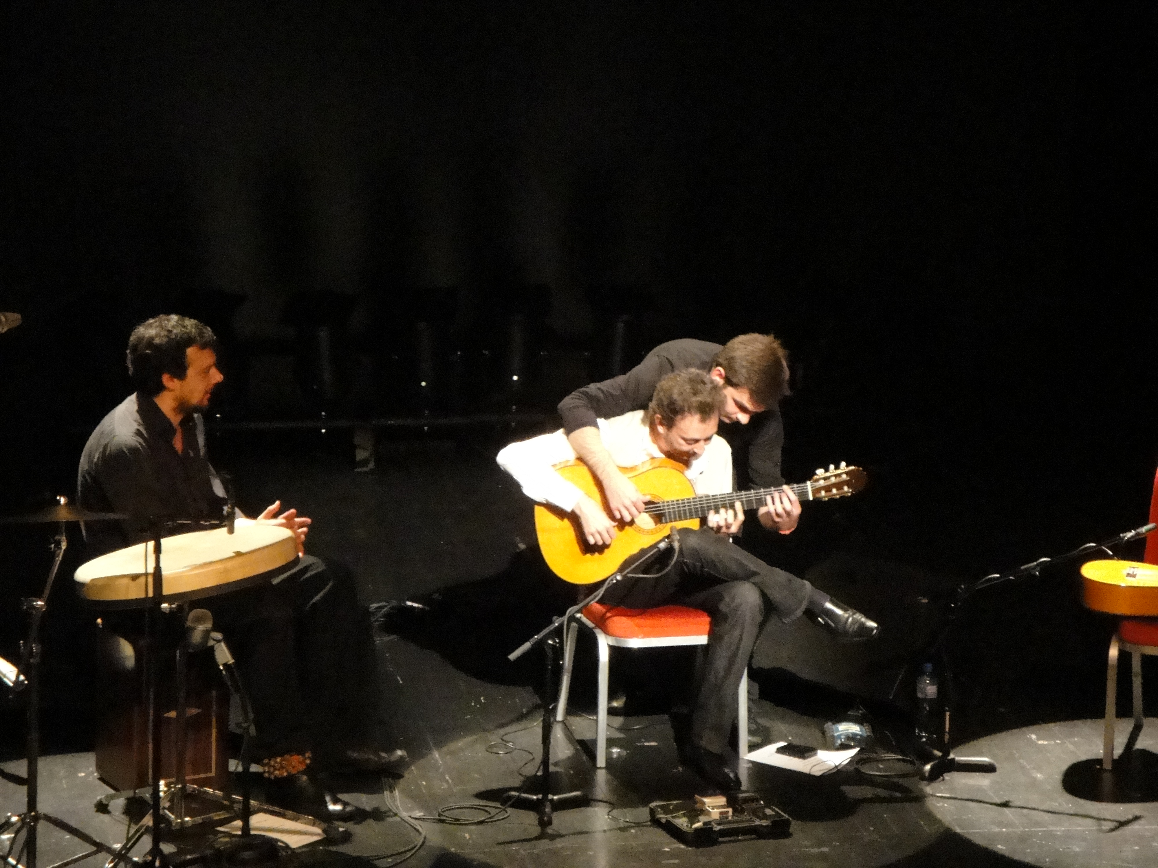 Jose Antonio Rodriguez beim in guitar Festival in Winterthur 2012